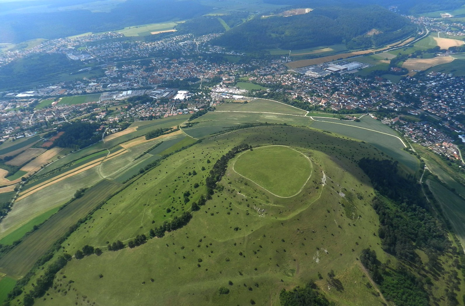 Ipf aus der Luft